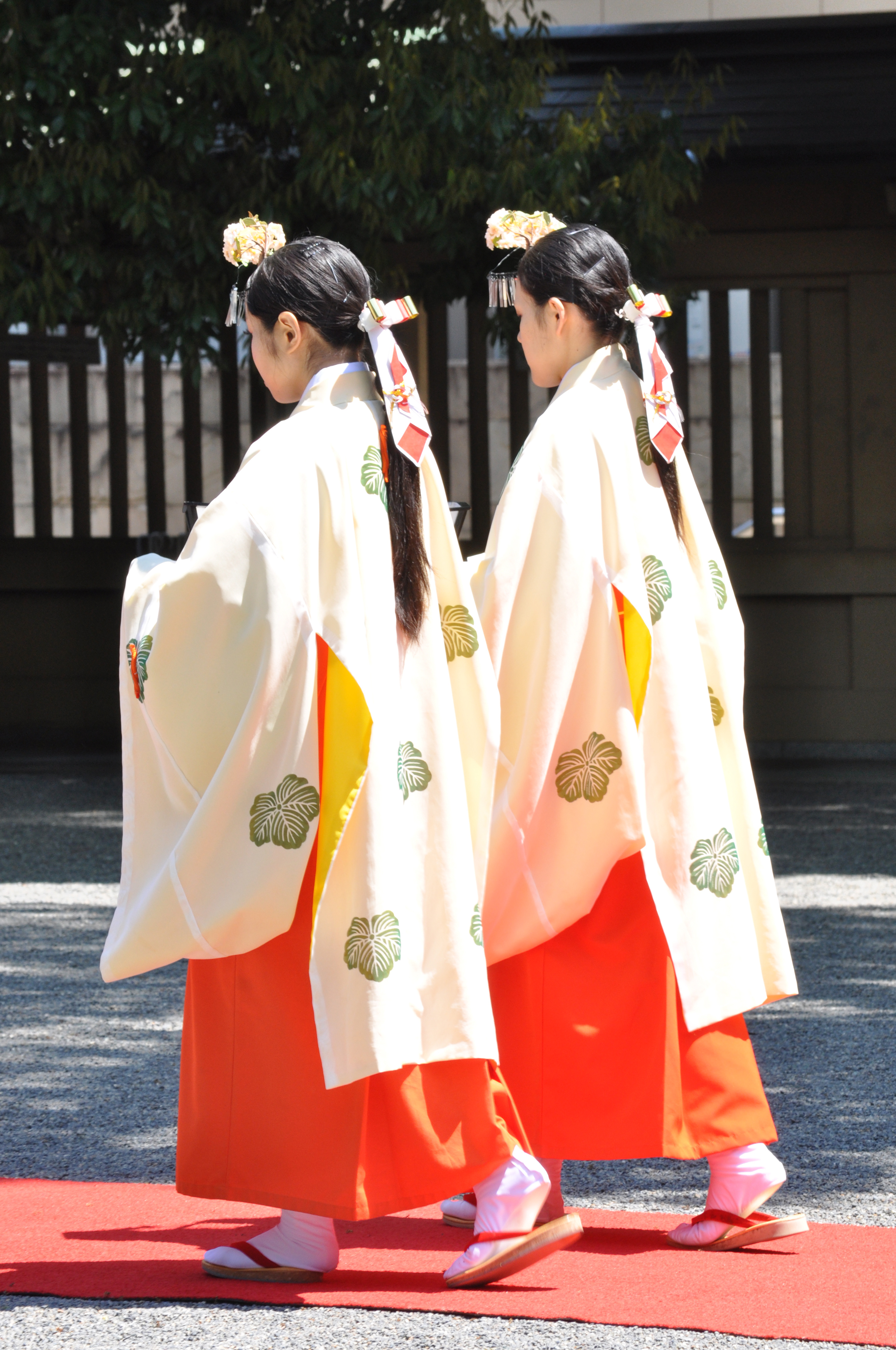 神楽の衣装をまとった巫女